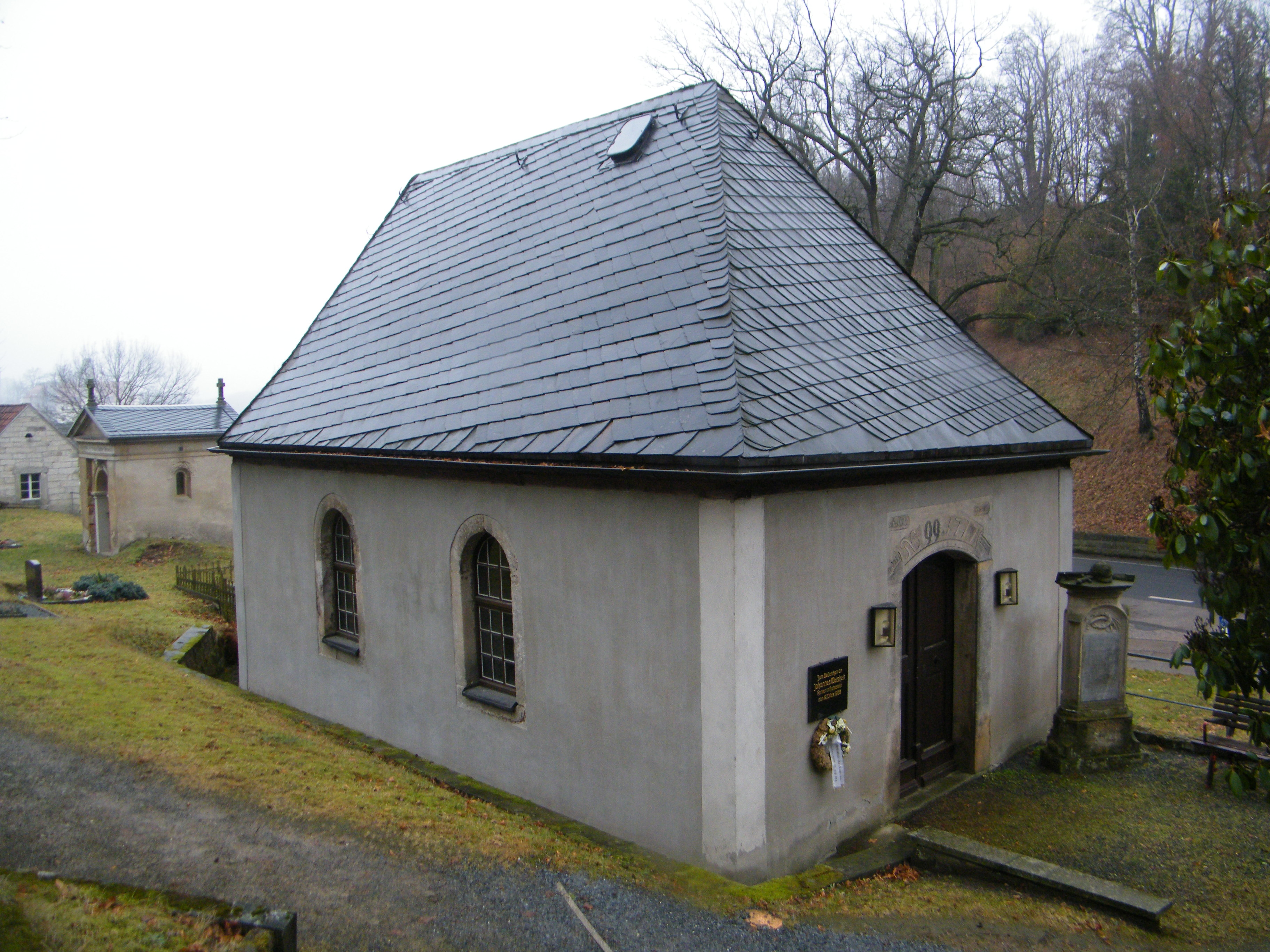 Hřbitovní kaple v Hohnsteinu